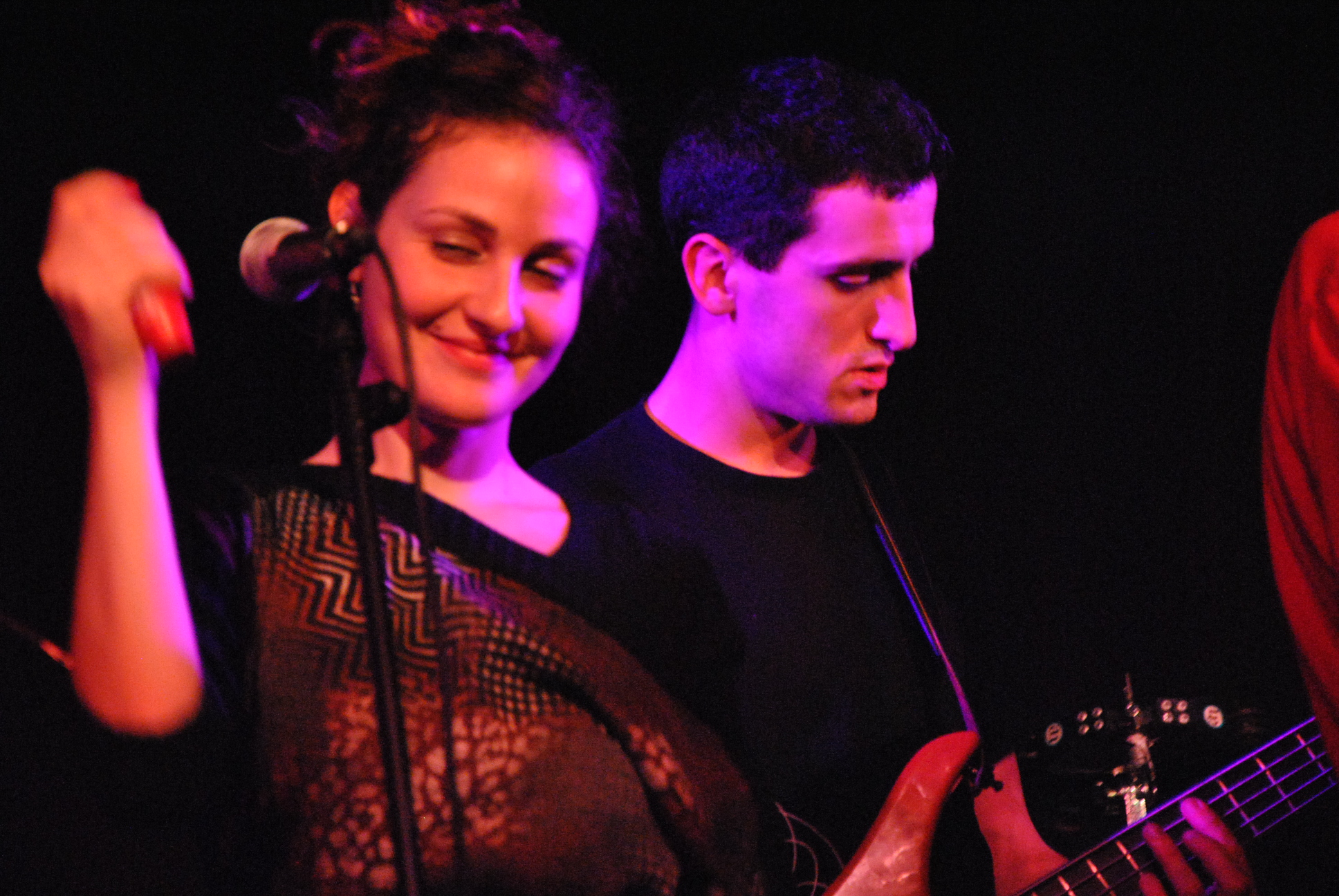 Color Humano live